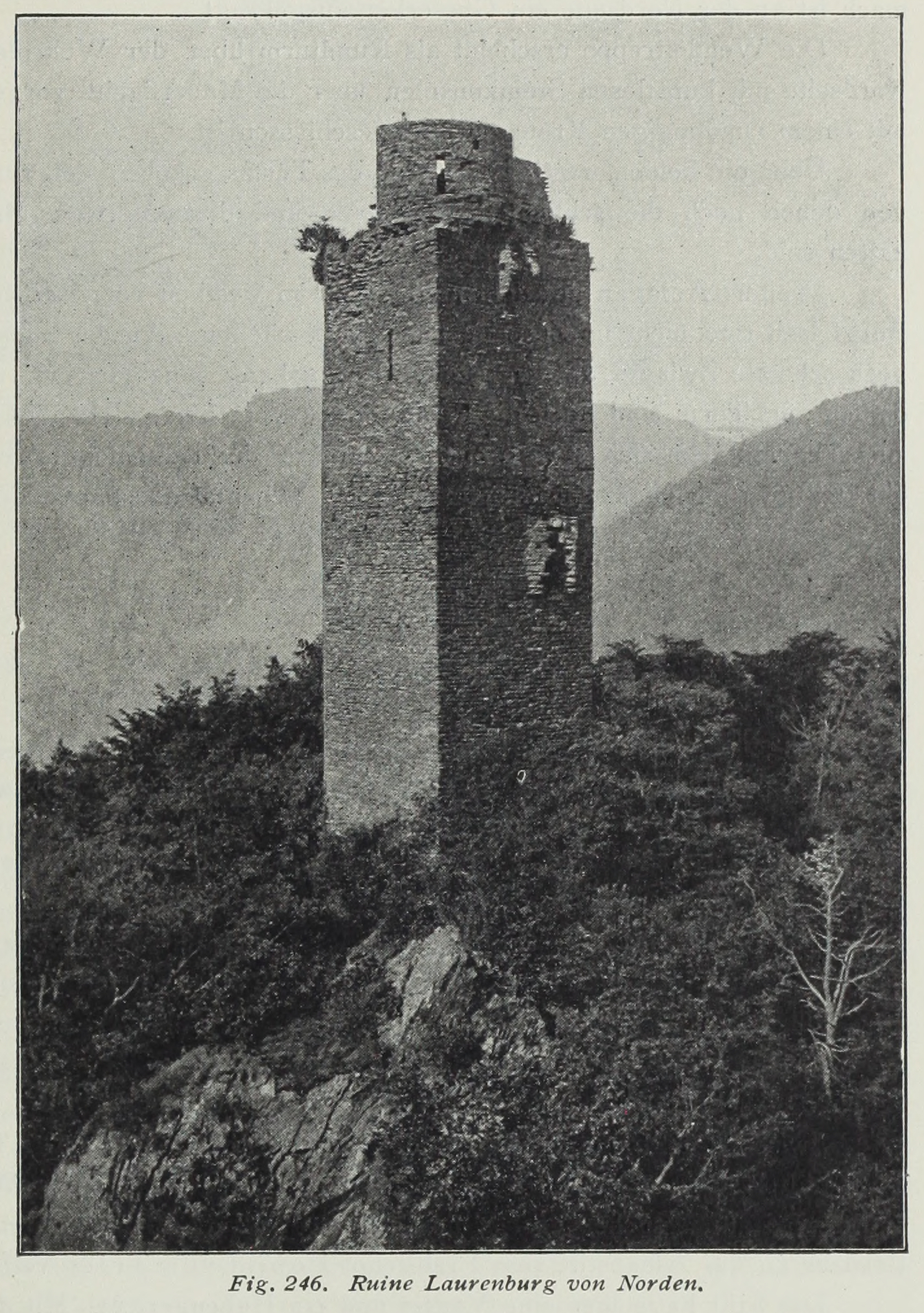 Ruine Laurenburg von Norden